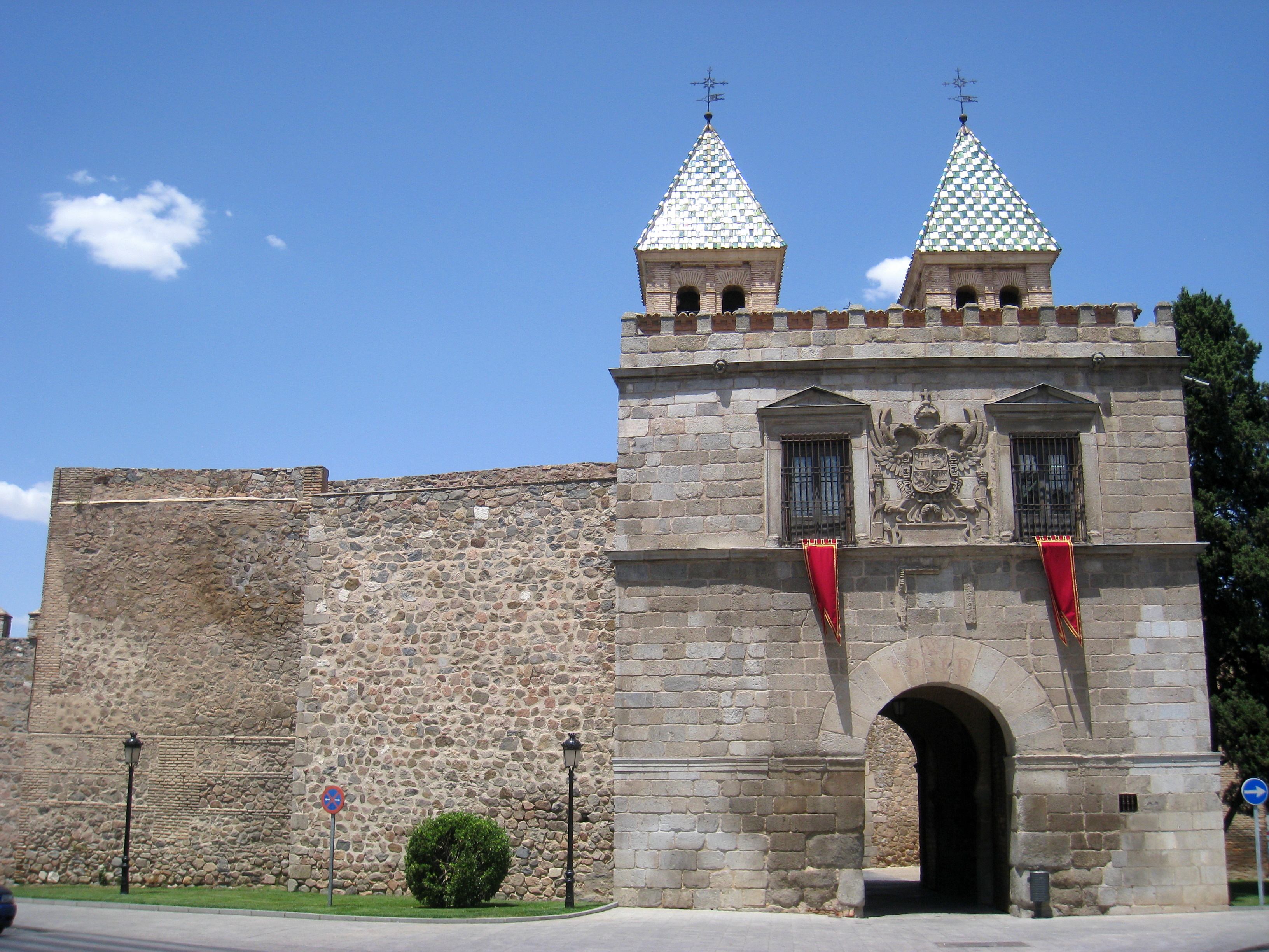 Puerta de Bisagra, Toledo, Spain.